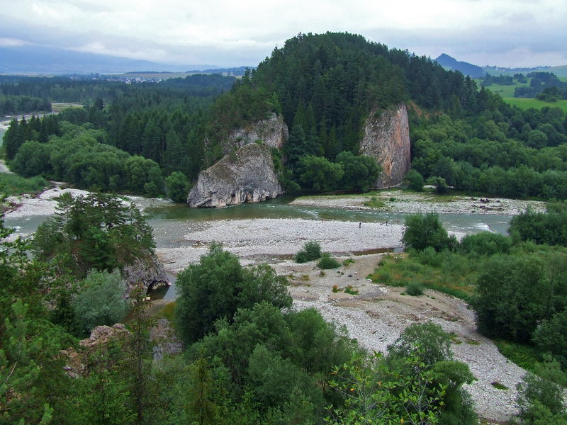 Przełom rzeki Białki. Na pierwszym planie "Kramnica"